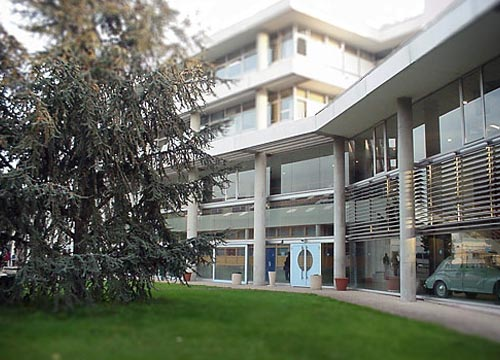 Le lycée Charles Petiet vu depuis l'avenue Gallieni.